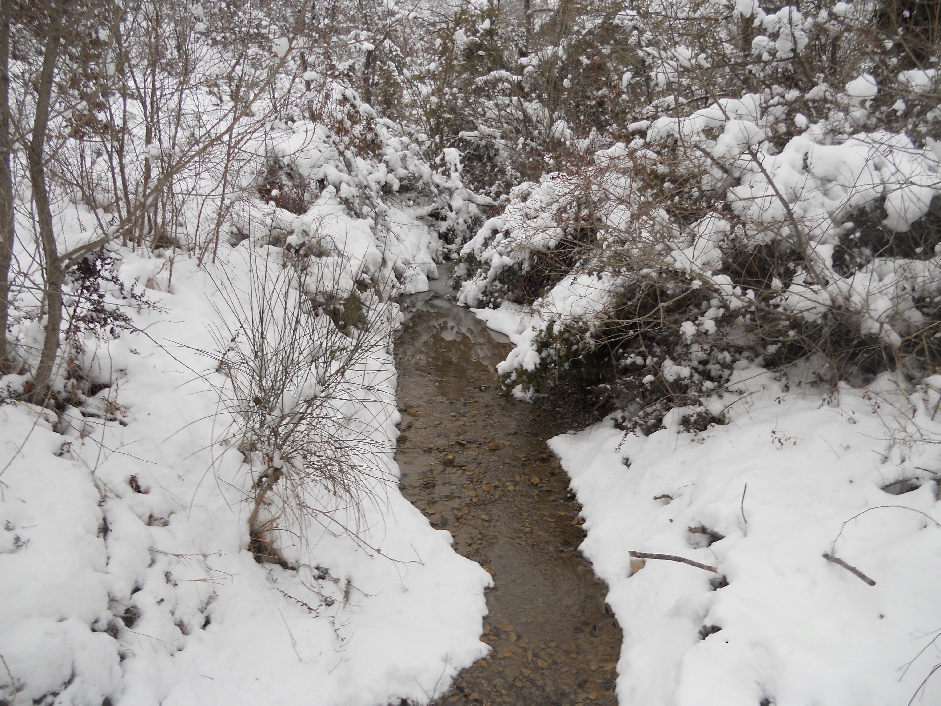 Torrente Mansolino in loc. Prugnano. 3.2.2012